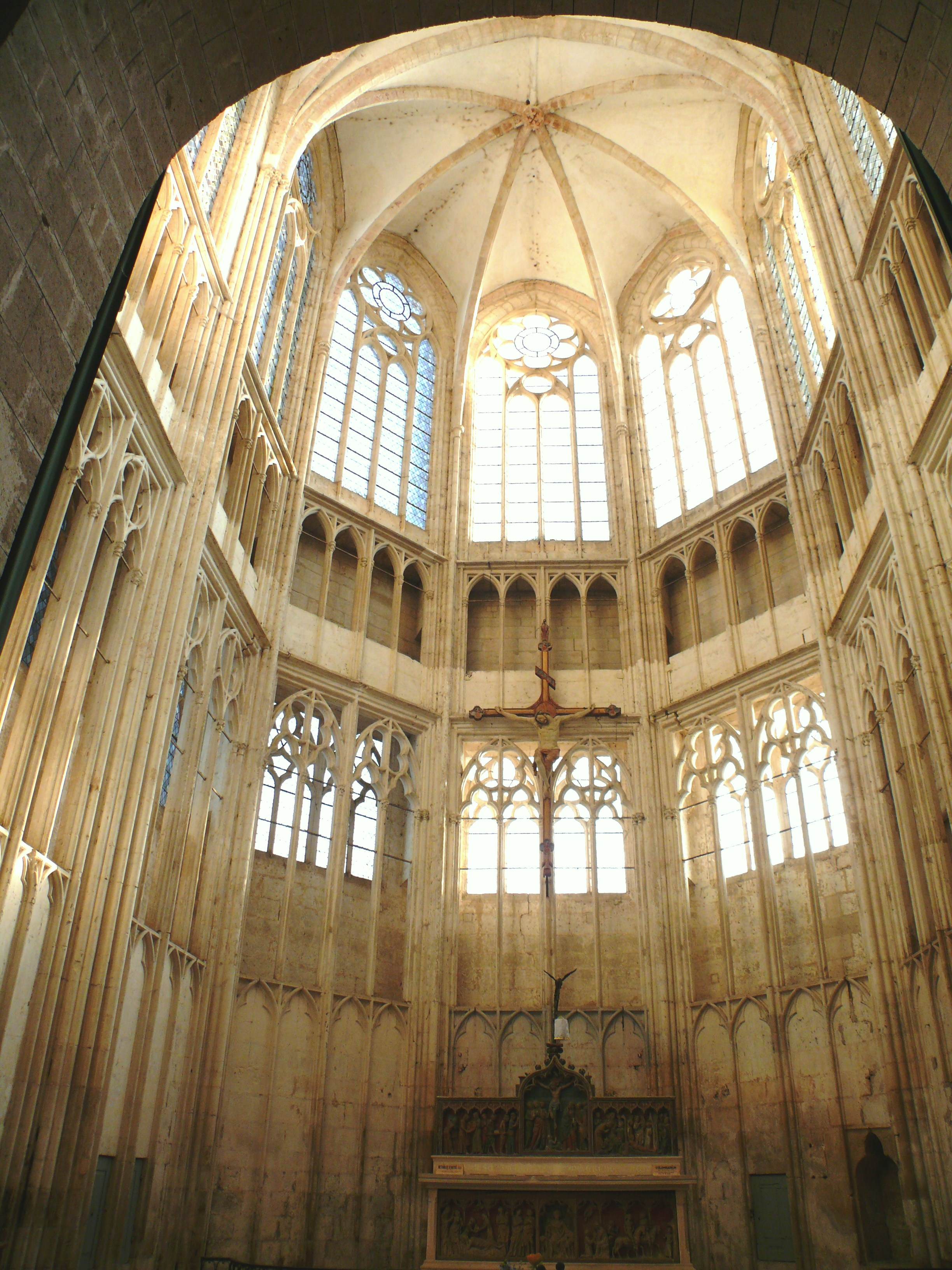 Prieuré Saint-Thibault - Choeur